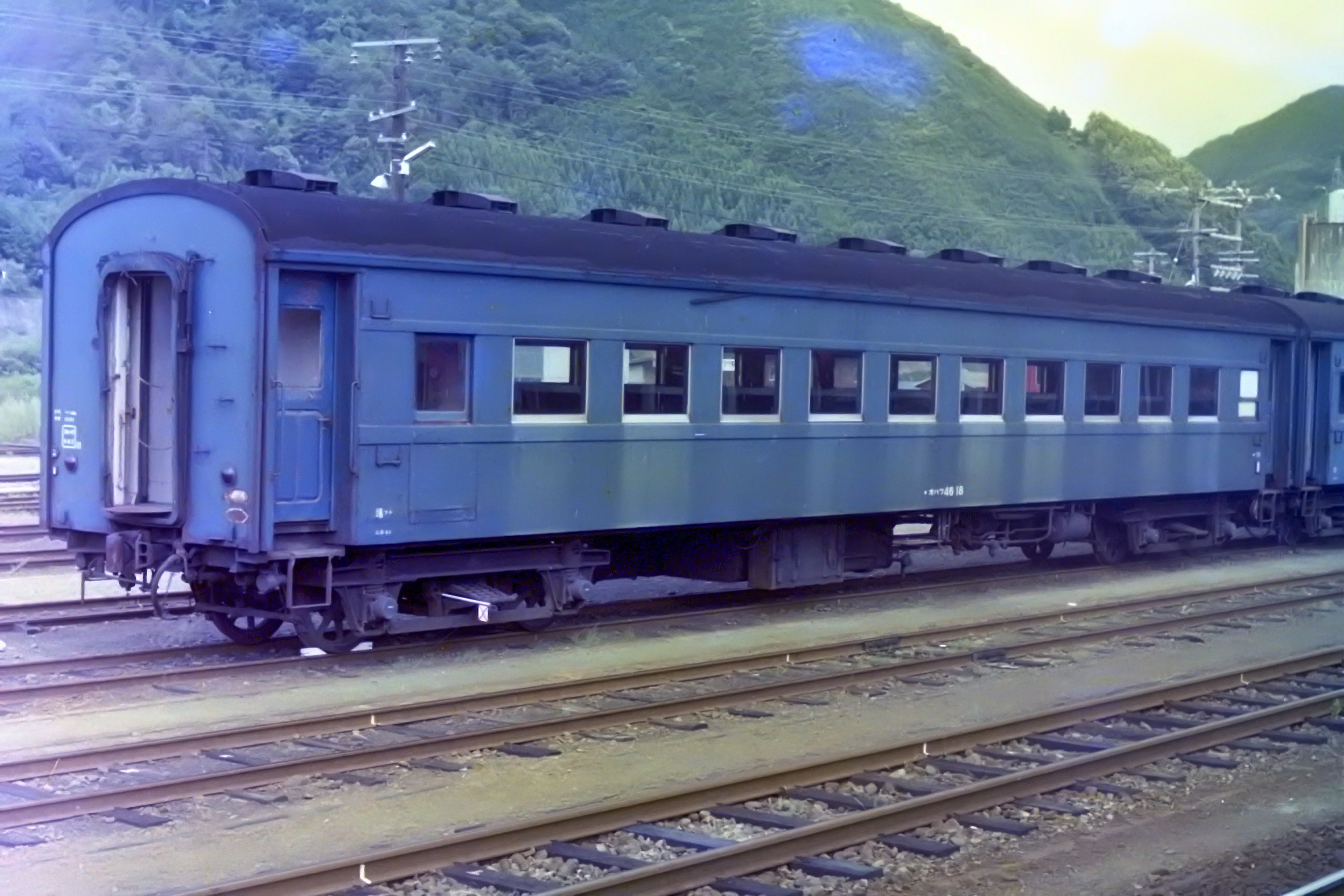 オハフ46 18 1985年8月 和田山駅